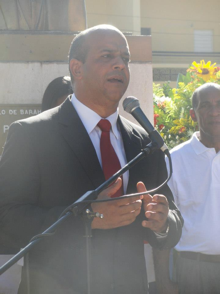 Tavito Suberví da discurso en la Plazoleta Duarte